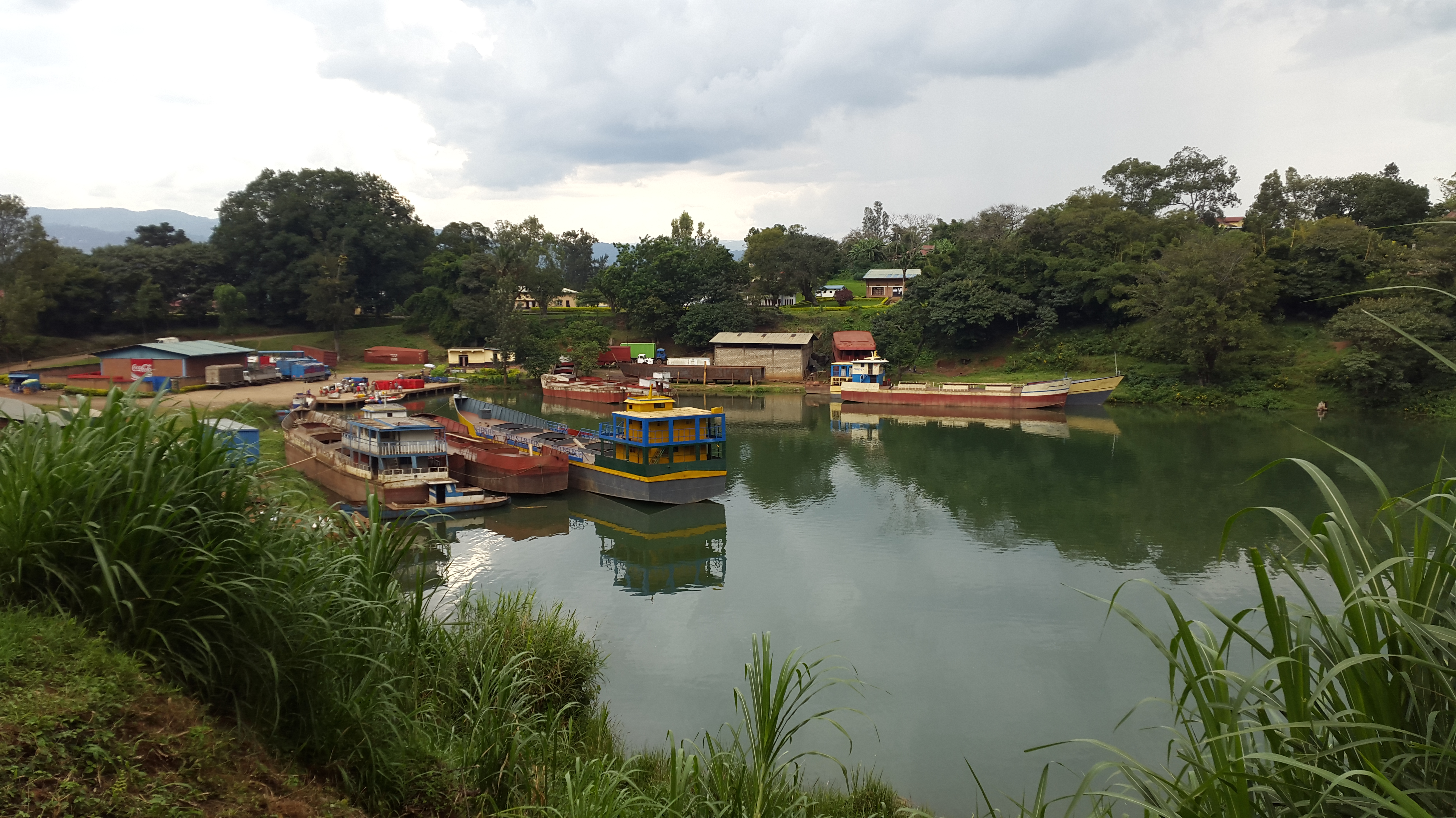 Shipyard in Cyangugu, Rwanda.